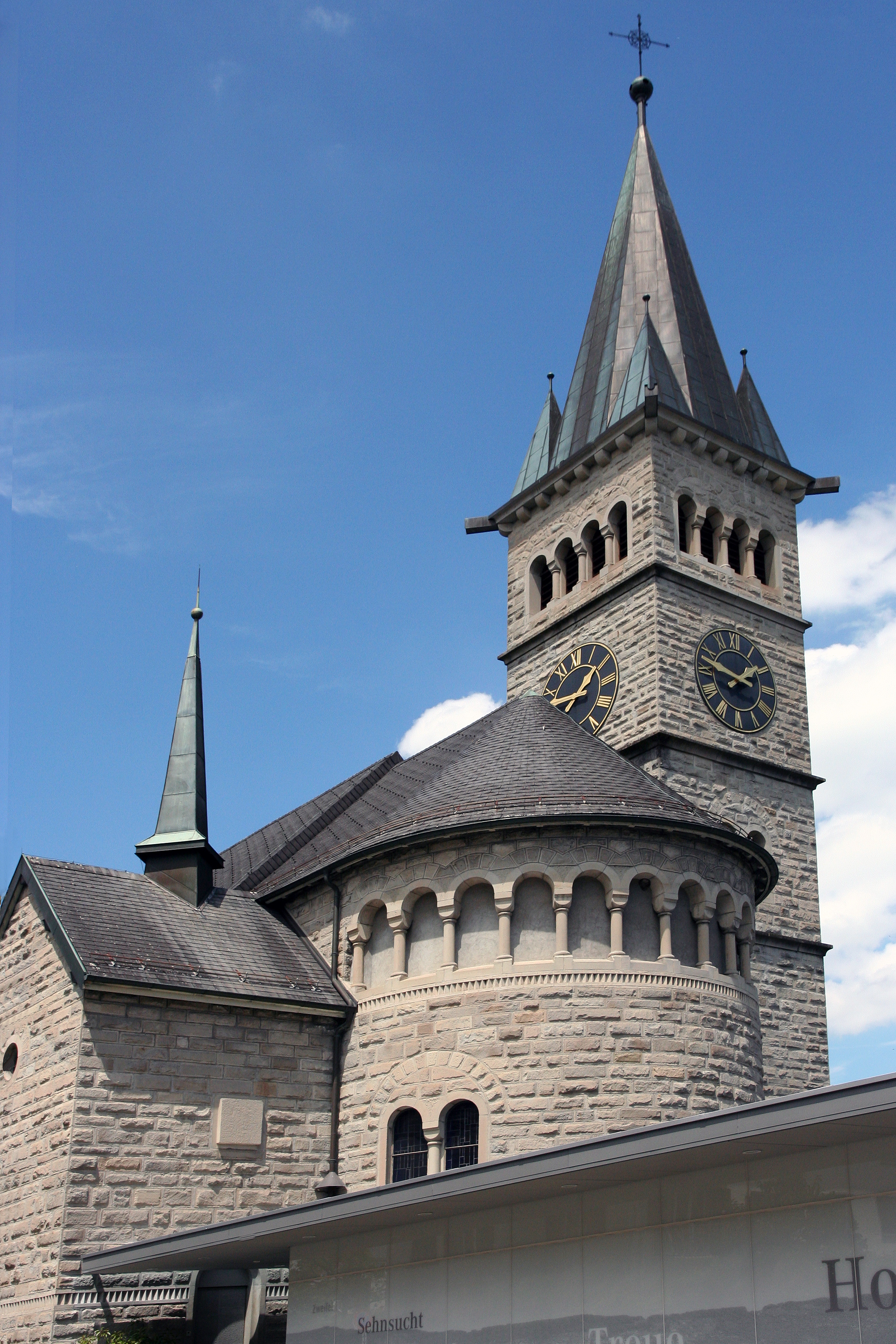 Römisch-katholische Pfarrkirche St. Marien Wädenswil, Apsis